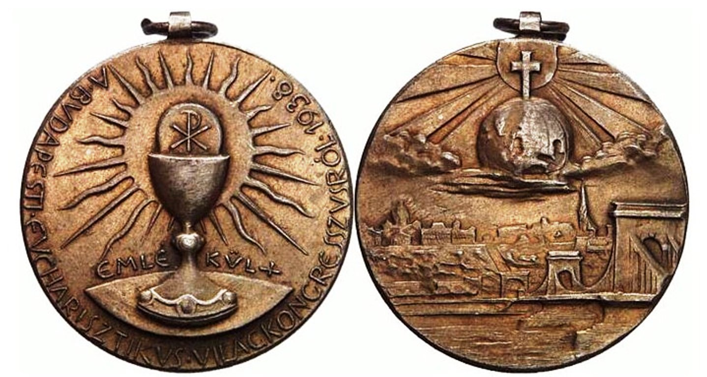 Eucharisztikus világkongresszus emlékérem 1938.